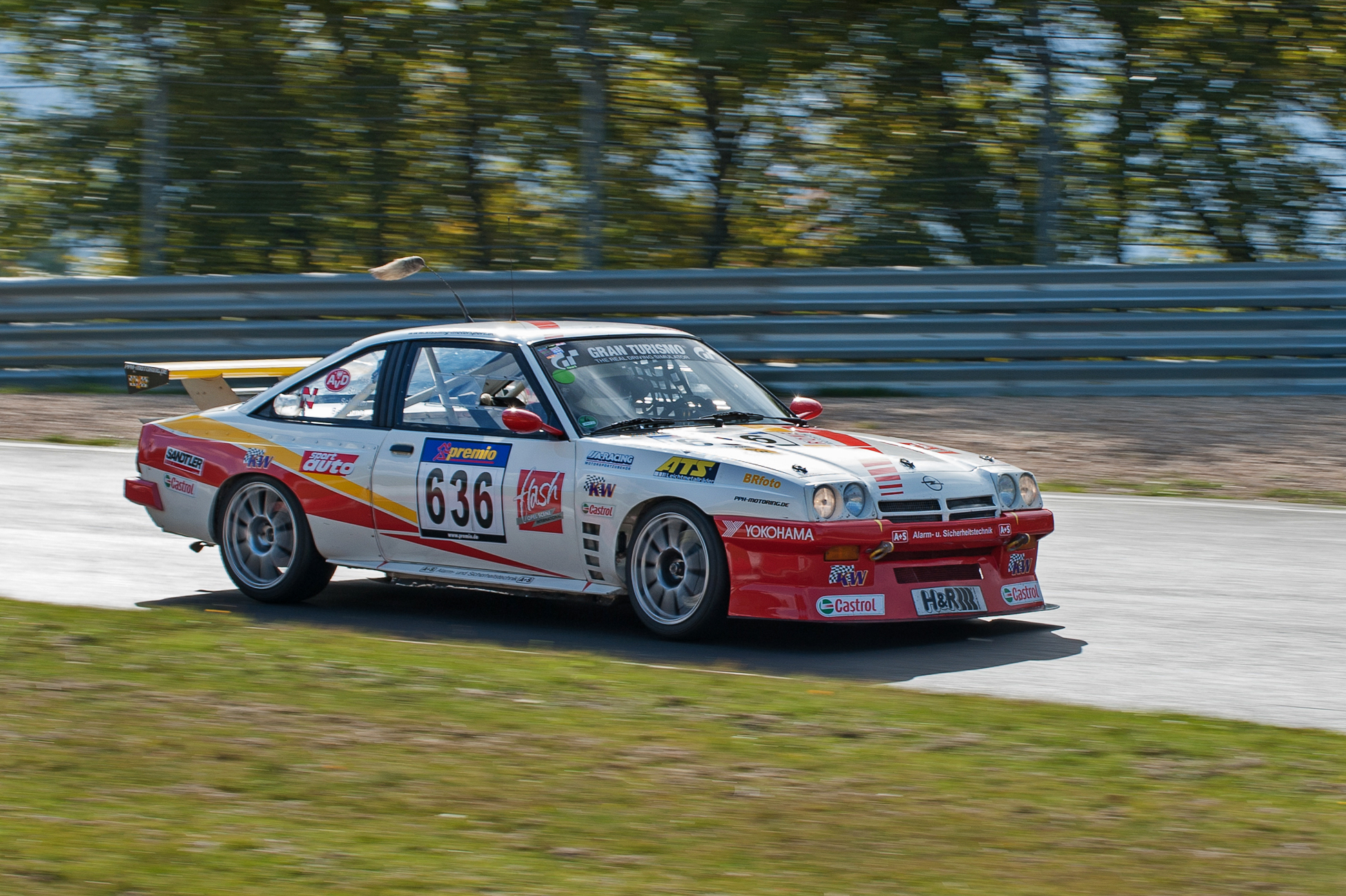 Opel Manta B "Fuchsschwanzedition" beim 9. Lauf der VLN-Serie auf dem Nürburgring. Fahrer: Olaf Beckmann und Peter Hass von Kissling Motorsport